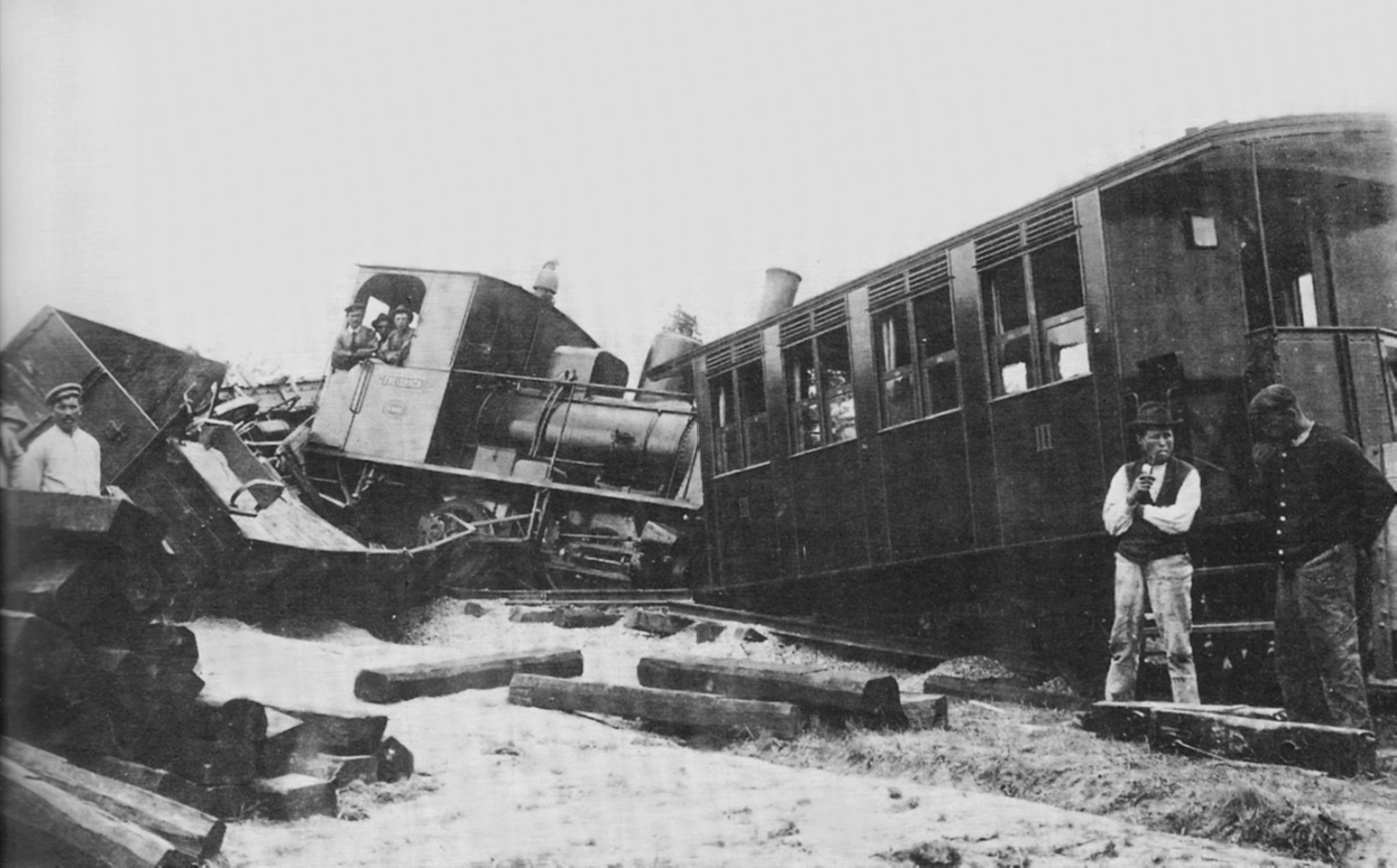 Unfall auf der im Bau befindlichen Lokalbahn Speyer-Geinsheim im Jahr 1905